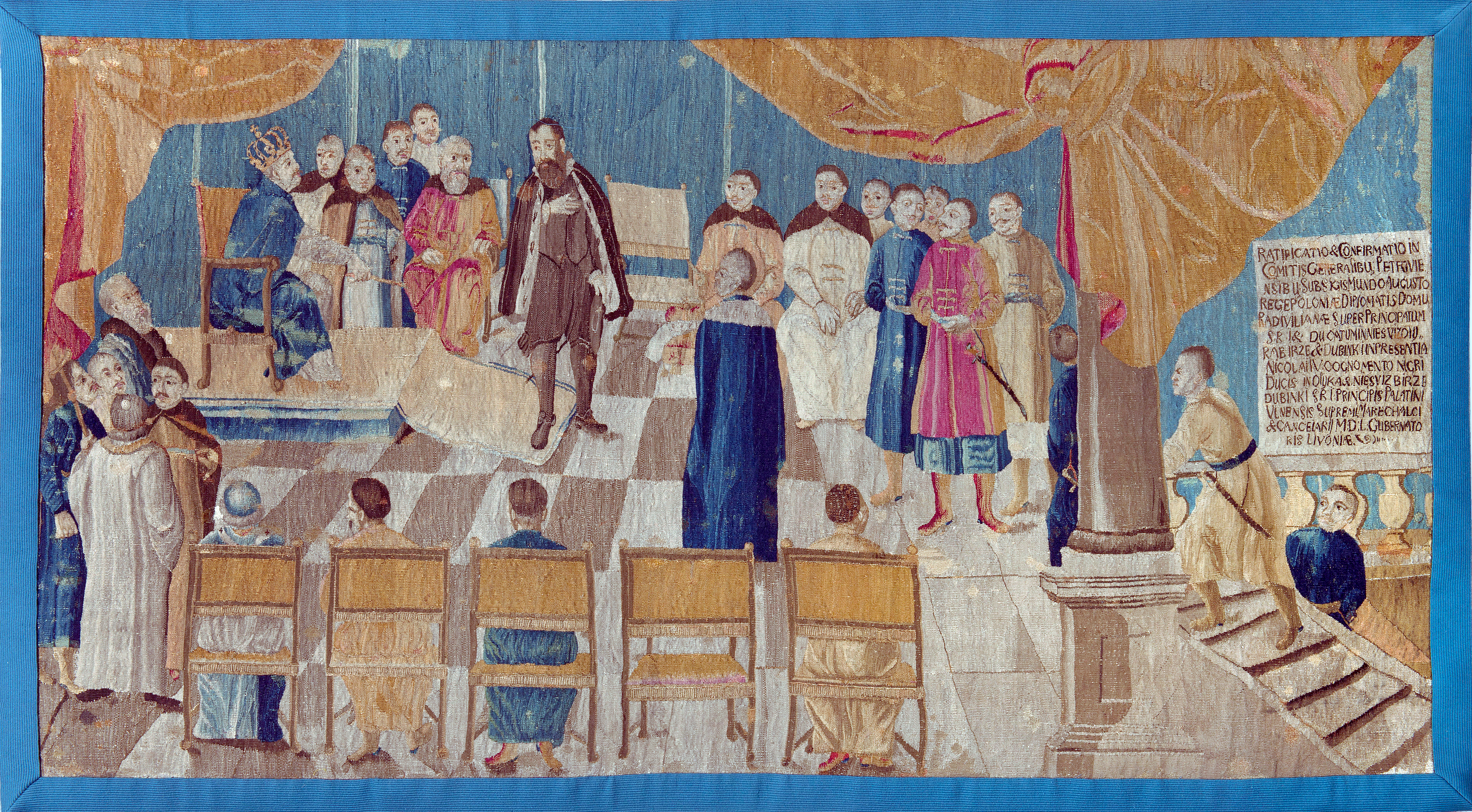 Беларуская (тарашкевіца): Вялікі князь Жыгімонт Аўгуст (Žygimont Aŭgust) пацьвярджае княскі тытул Мікалаю Радзівілу «Чорнаму» (Mikałaj Radzivił «Čorny») на сойме 1549 году. Габэлен